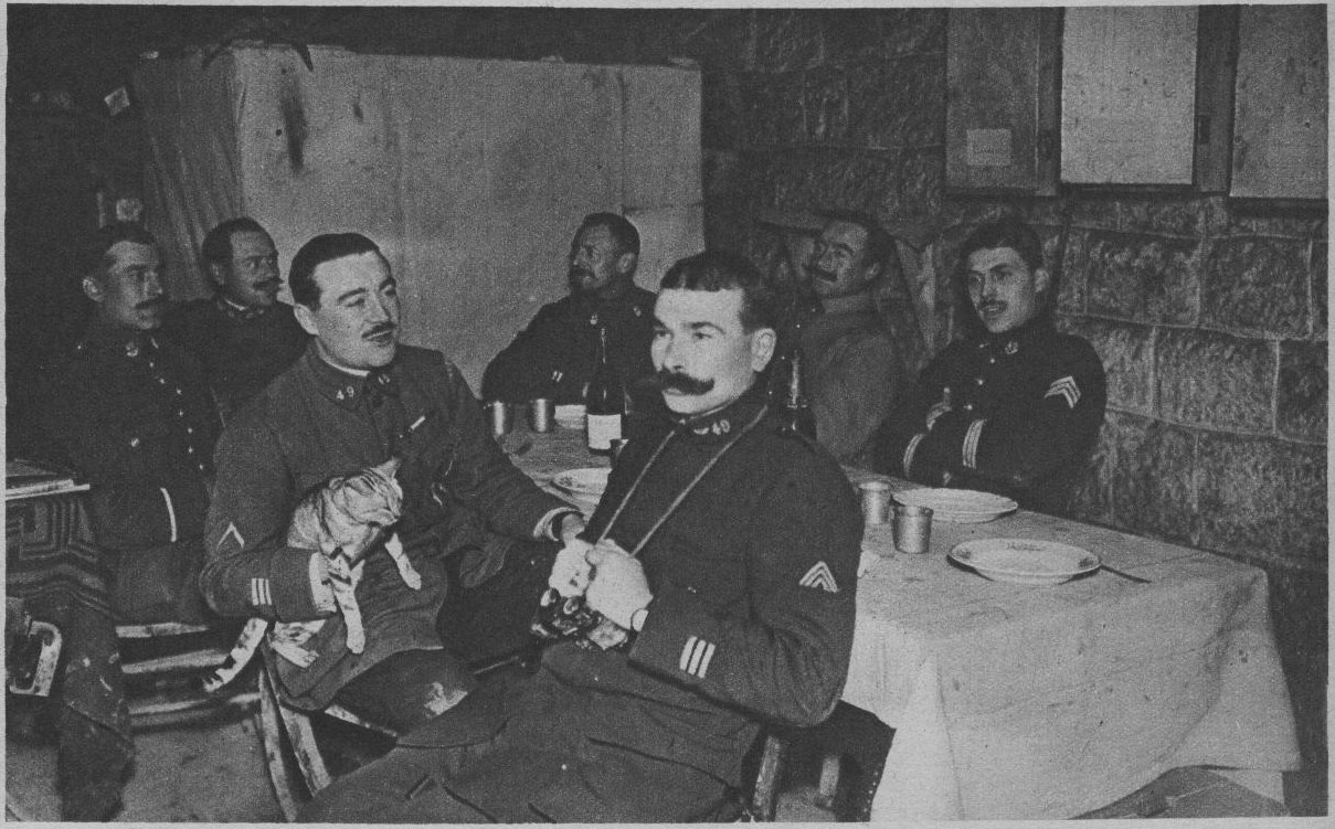 Le Miroir_N°165, page_5, le_fort_de_douaumont_noël_à_l'infirmerie_21_janv_17.